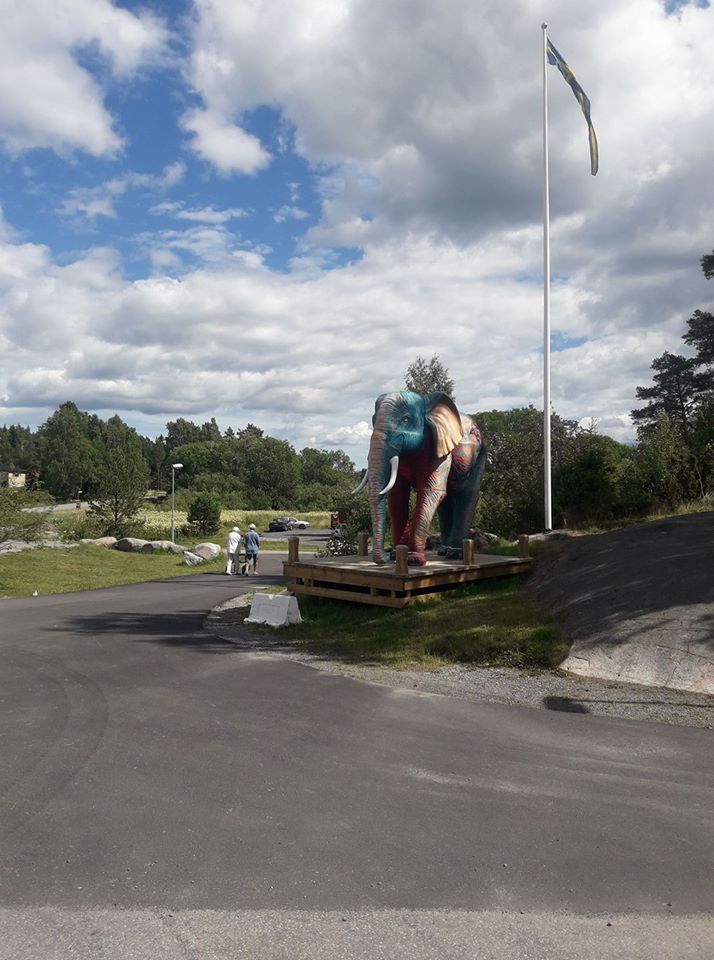 Graffitimålade elefanten Ljumbo vid Ljusterö Torg, ägd av Ljusterö konstförening, och tidigare av elefantskötaren Dan Koehl